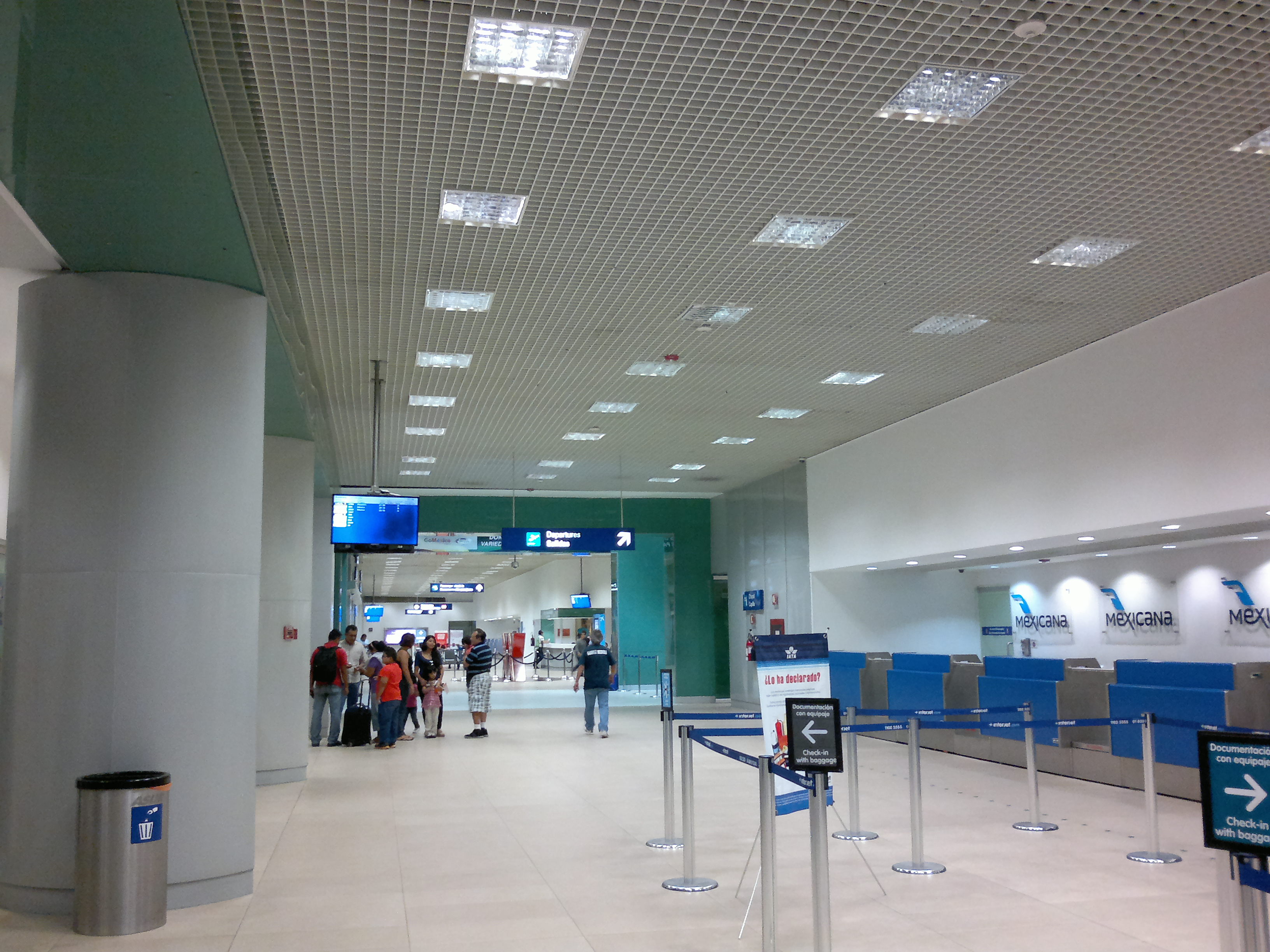 La terminal de vuelos nacionales del Aeropuerto de Mérida.